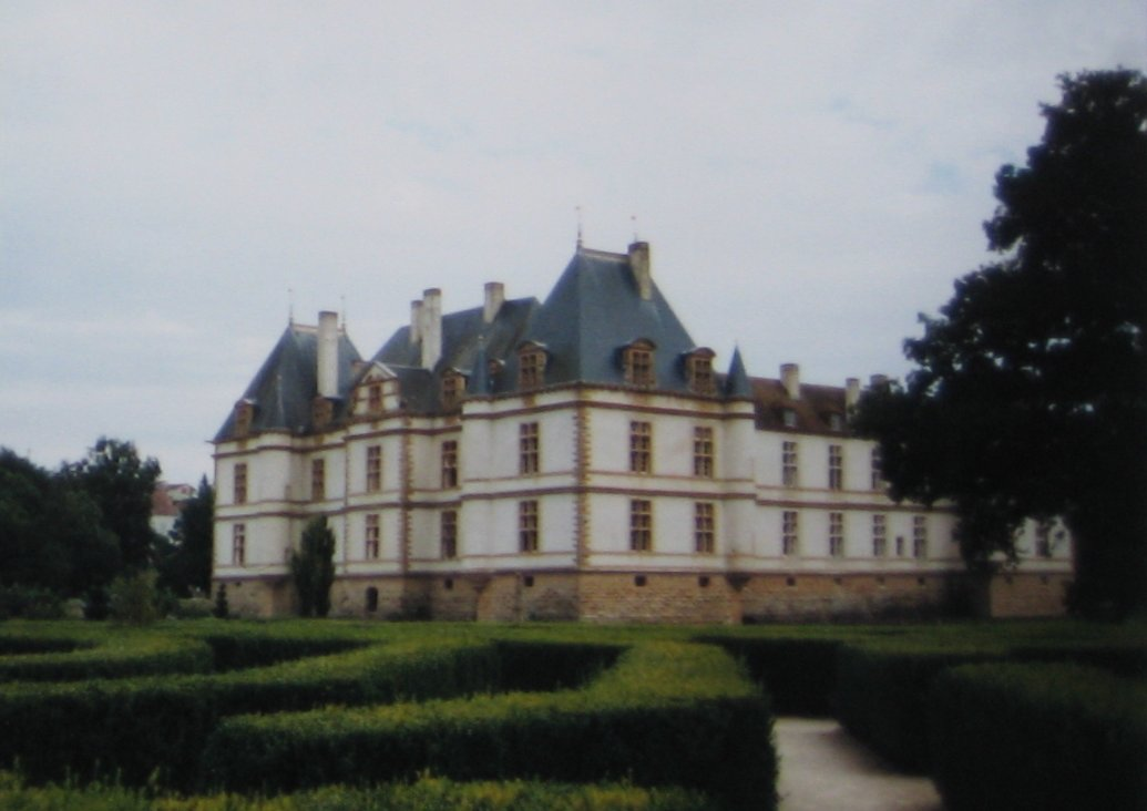 Kateel van Cormatin